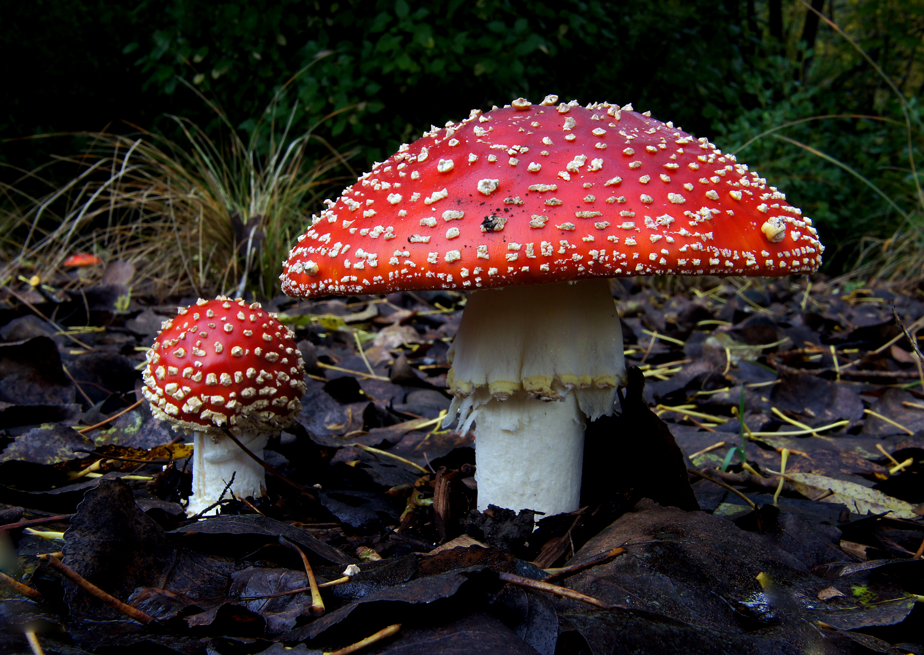 Amanita muscaria (1)